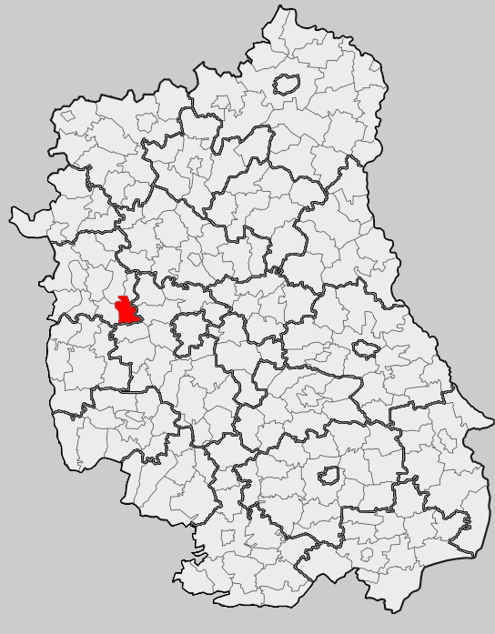 Map of gmina Nałęczów, Puławy county, Lublin voivodship Mapa gminy Nałęczów, powiat puławski, województwo lubelskie